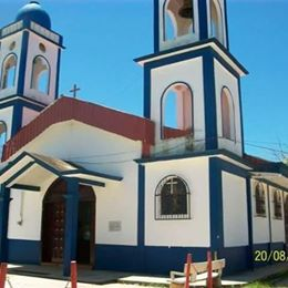 iglesia San Isidro labrador Suchilapan del Rio, Jesus Carranza Veracruz Mexico